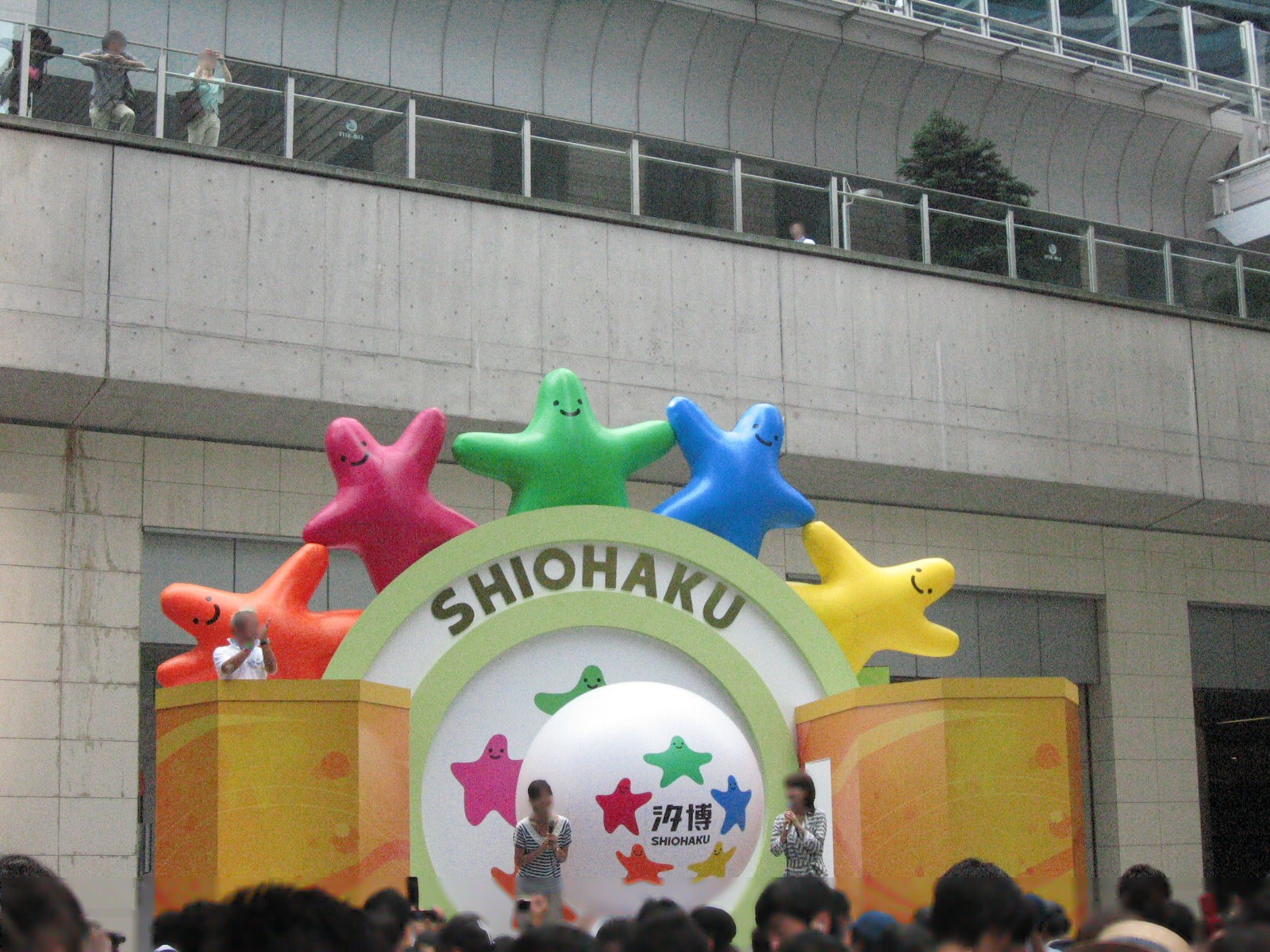 日本テレビの夏イベント『汐博2011』のメインステージ「ぱっツンSTAGE」。 2011年8月15日に同会場で撮影したものをPhotostudio5.5にて編集。